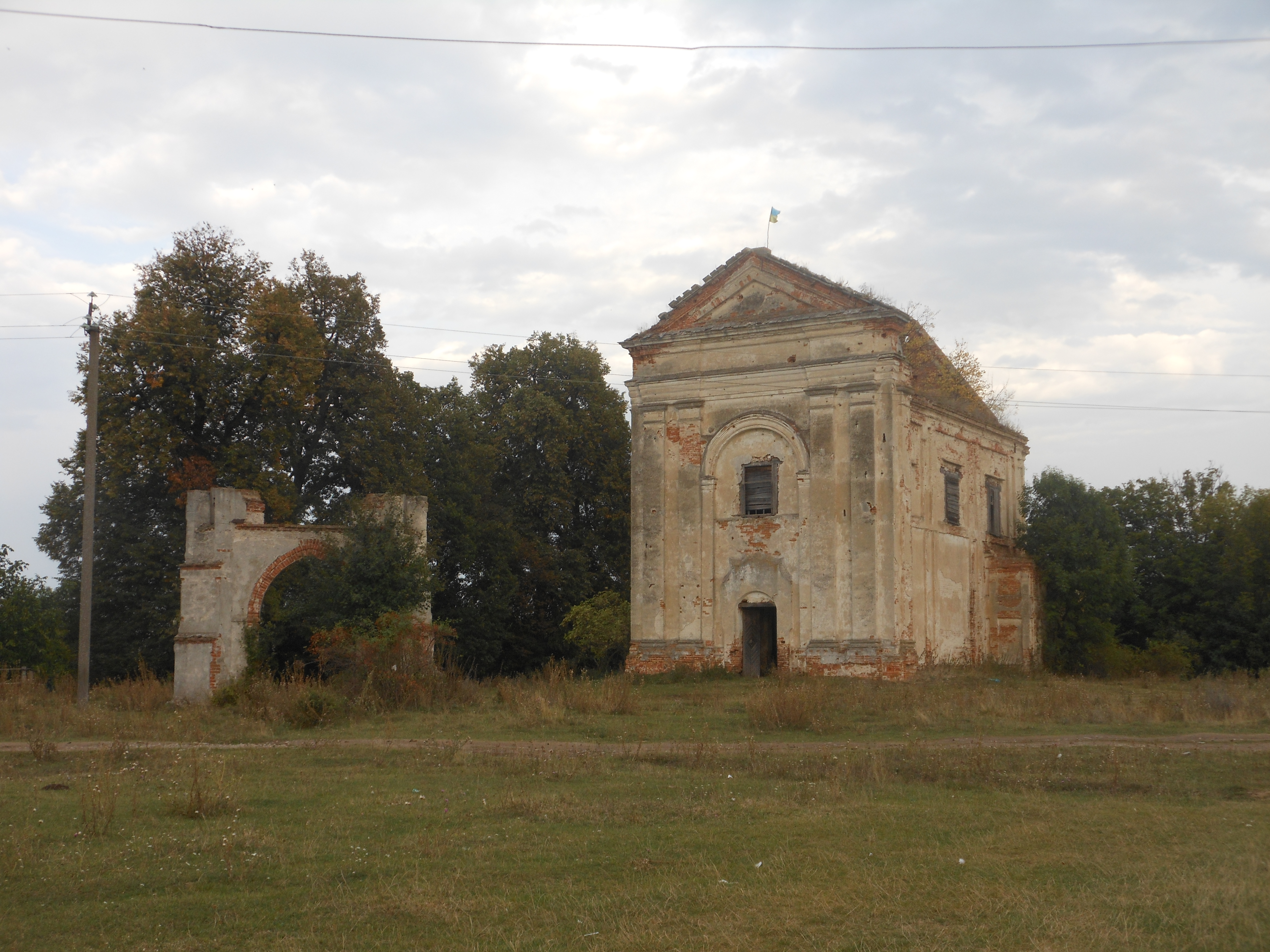 Костьол Пресвятої Трійці, Маньківці